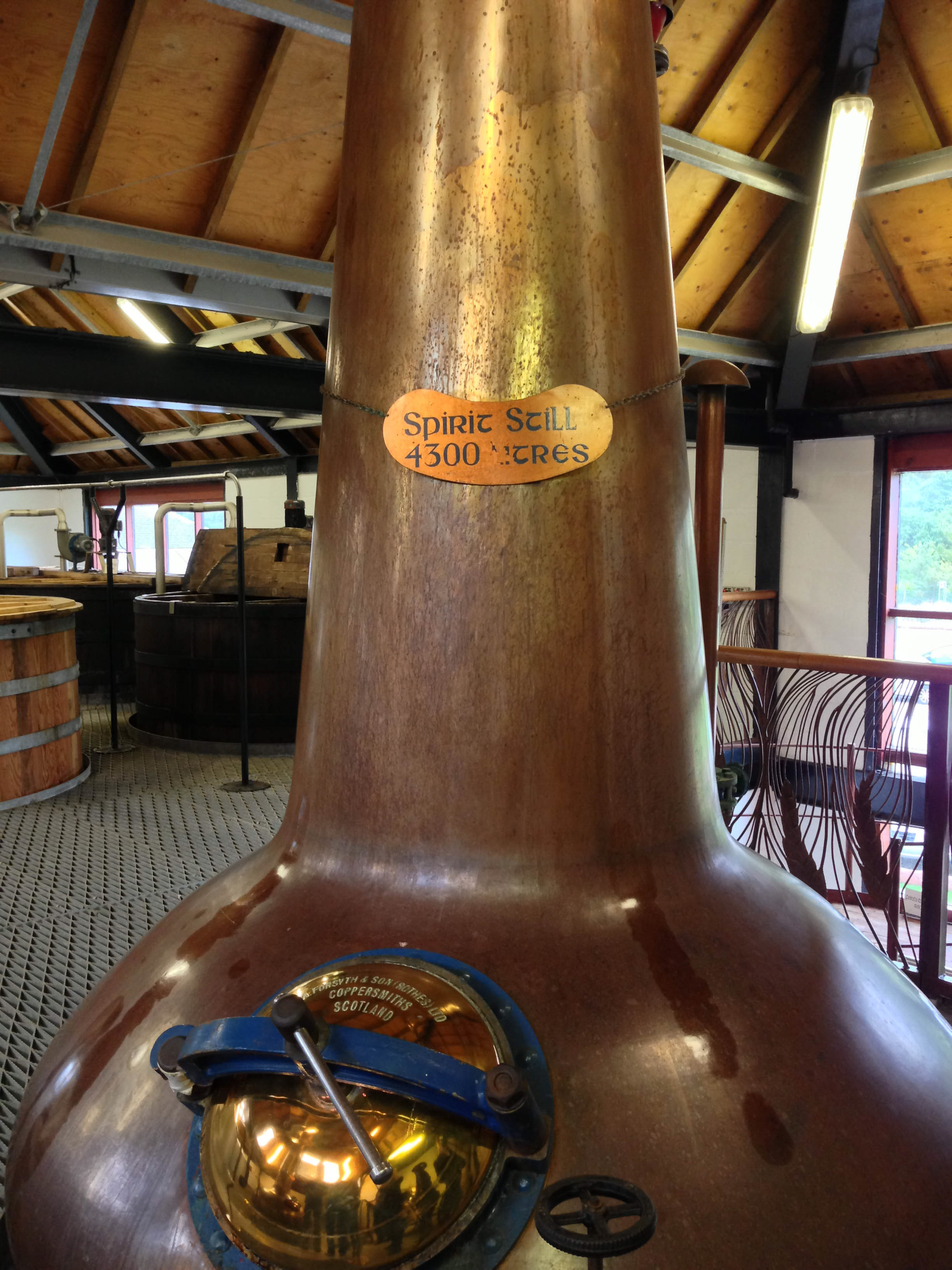 Spirit still